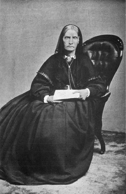 Annette (Anna) Sutter-Dübeld. Fotografie in Privatbesitz.